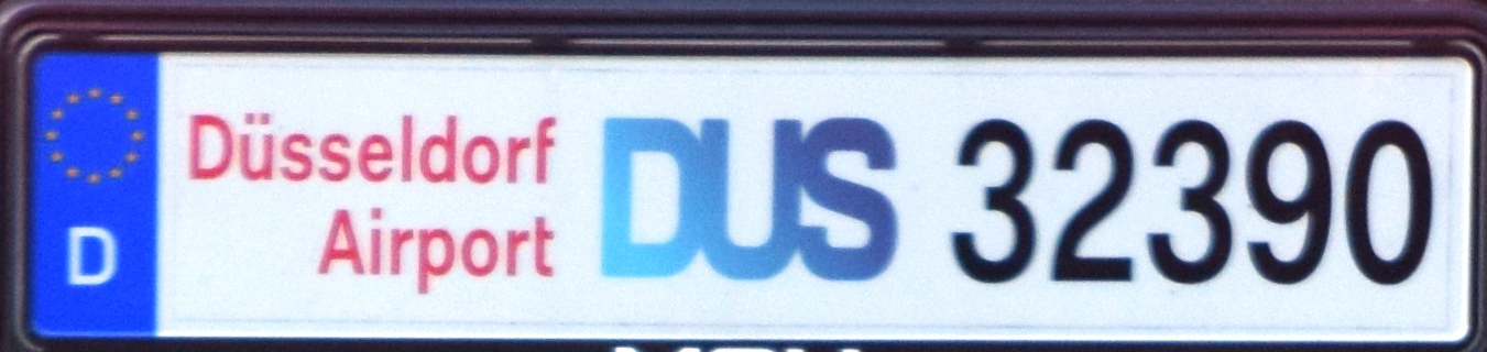 Kentekenplaat van voertuigen die rondrijden op het vliegveld Düsseldorf